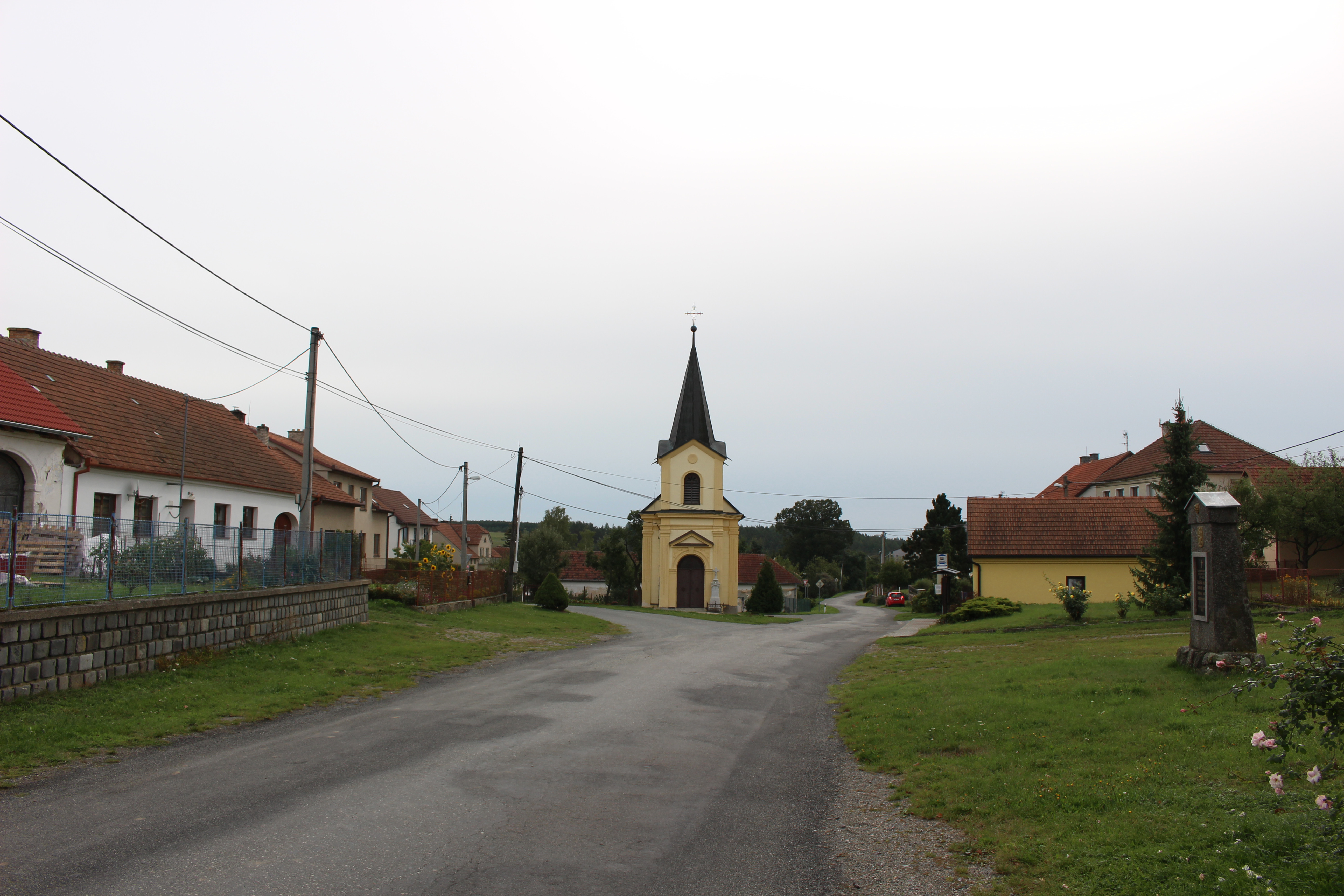 obec Tišnovská Nová Ves, okres Brno-venkov, střed obce s kaplí Nanebevzetí Panny Marie